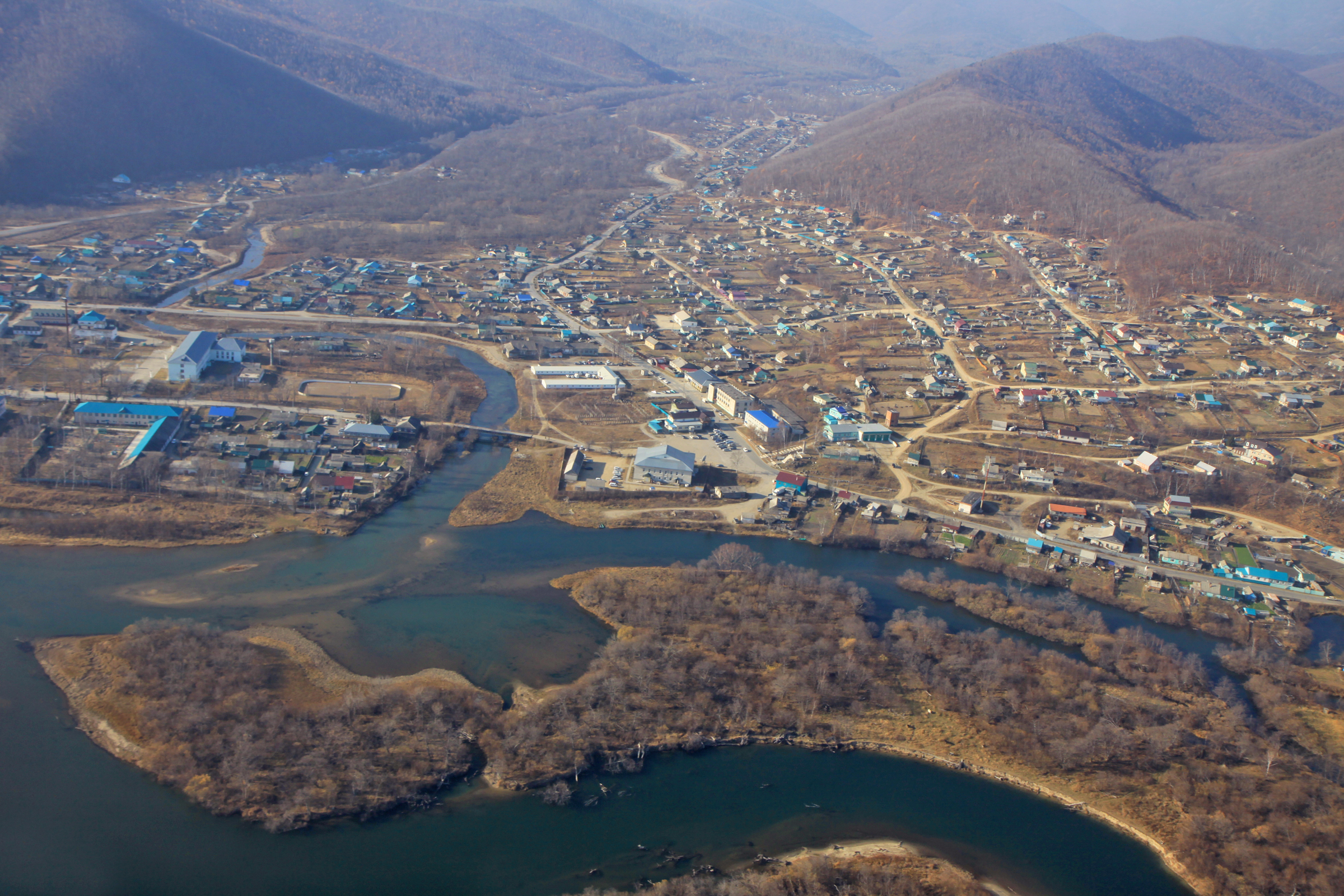 Вид на Терней из самолета DHC-6